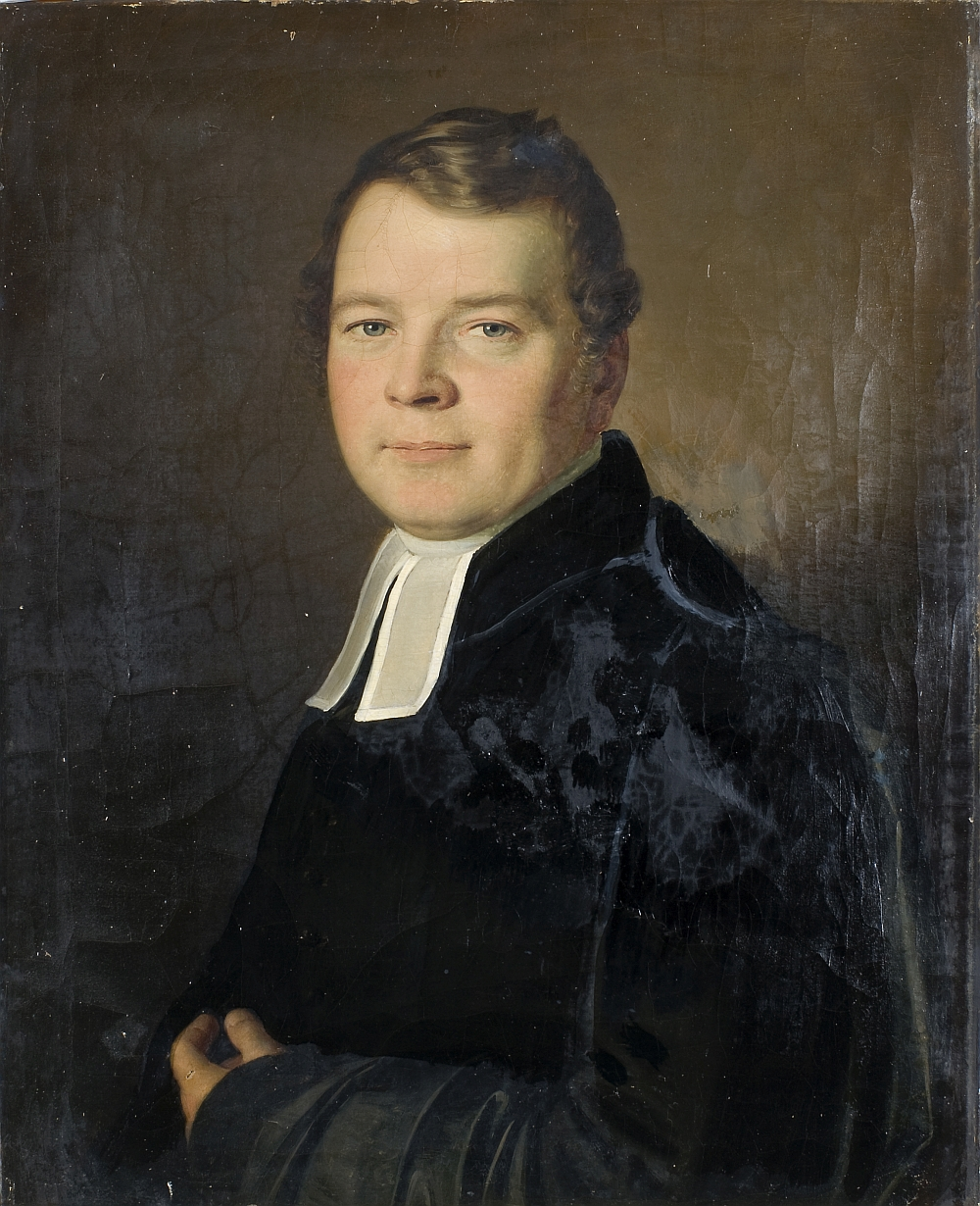 Prediger der Deutschen evangelischen Kirchengemeinde von Pest (Ungarn), Gemälde von einem unbekannten Meister um 1830